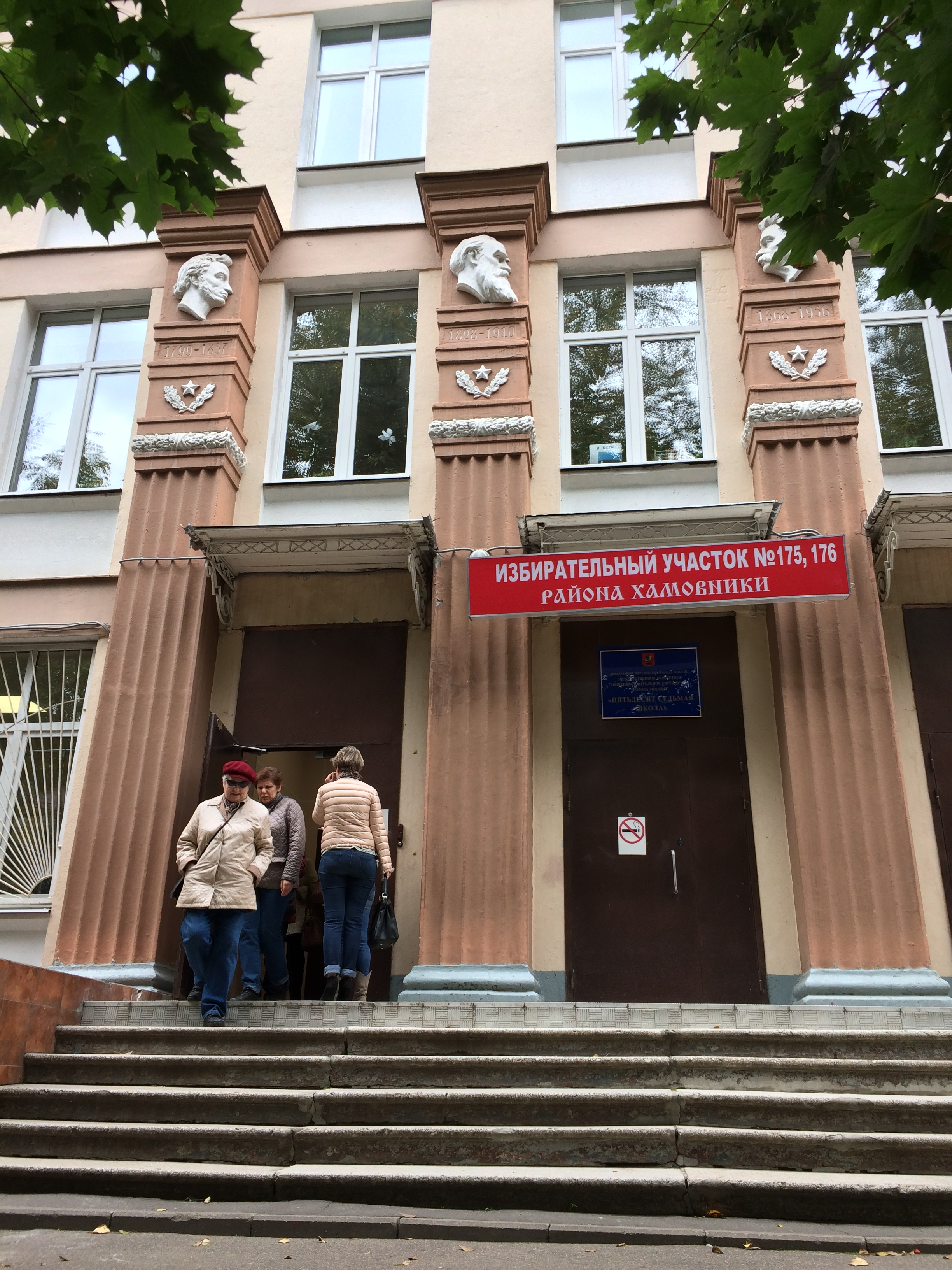 Голосование 18 сентября 2016 года. 57 школа, улица Хамовнический Вал, дом 26.